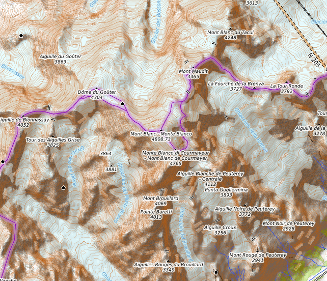 Carte topographique du Mont-Blanc This map may be incomplete, and may contain errors. Don't rely solely on it for navigation.